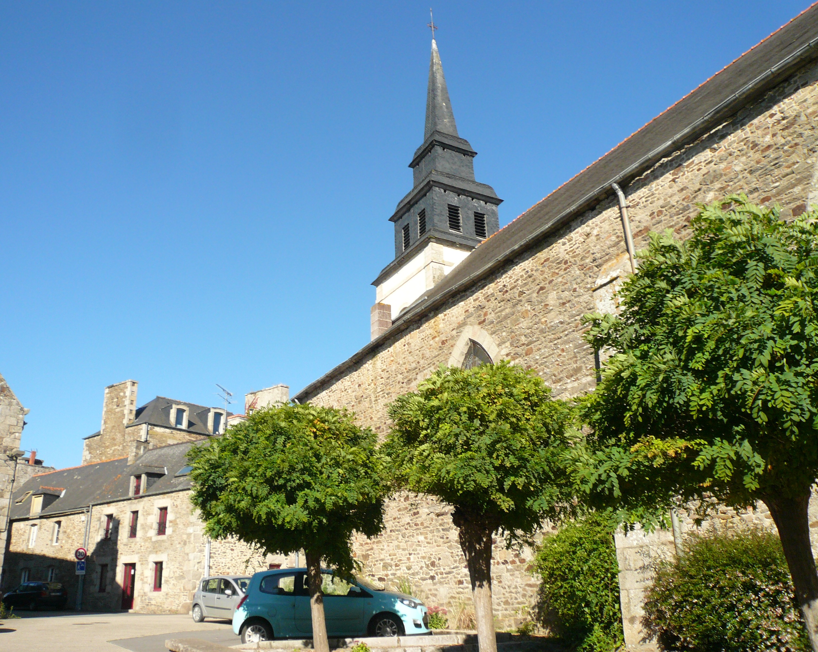 L'arrière de église Saint-Pierre de Corseul vue de la rue de Lessard.